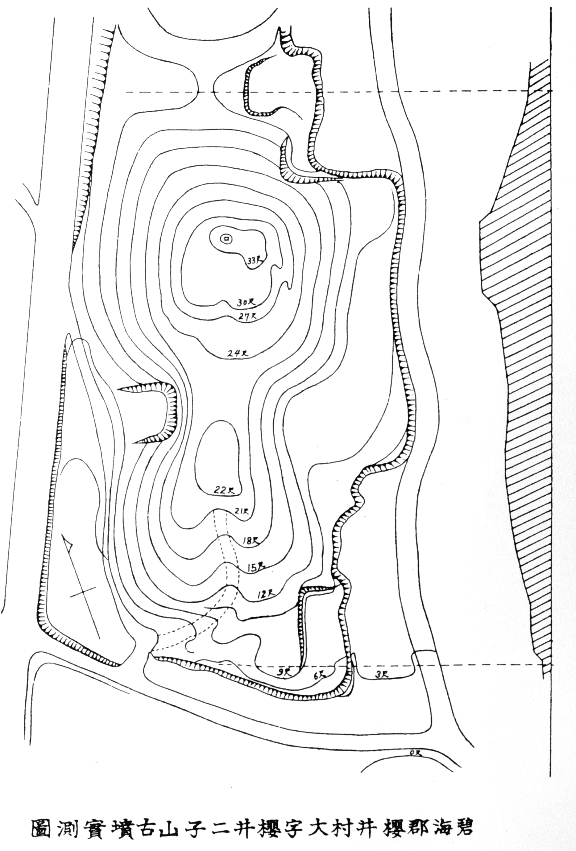 1936年当時の桜井二子古墳